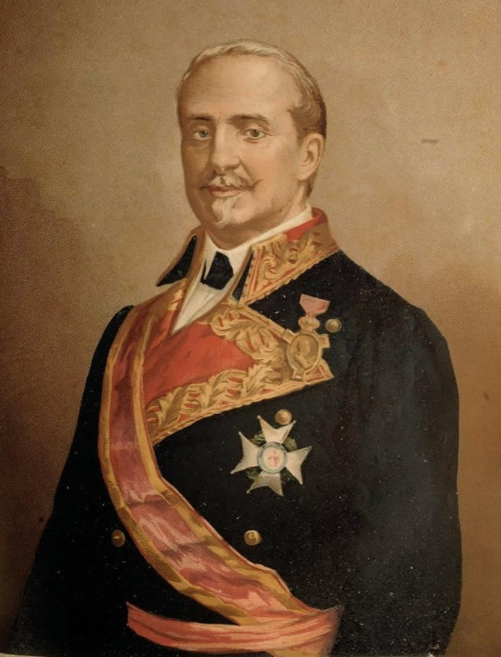 Litografía de Leopoldo O´Donnell, político español.